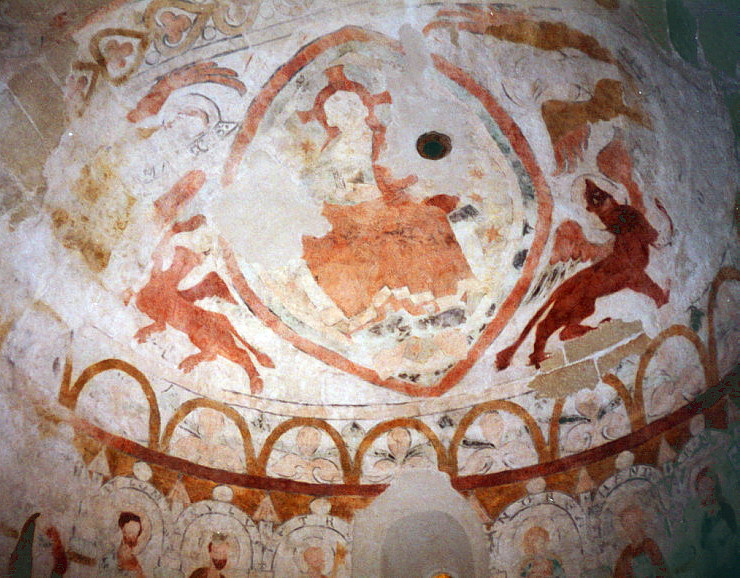 Szent András római katolikus templom (Hidegség, ) This is a photo of a monument in Hungary, Identifier: 4451